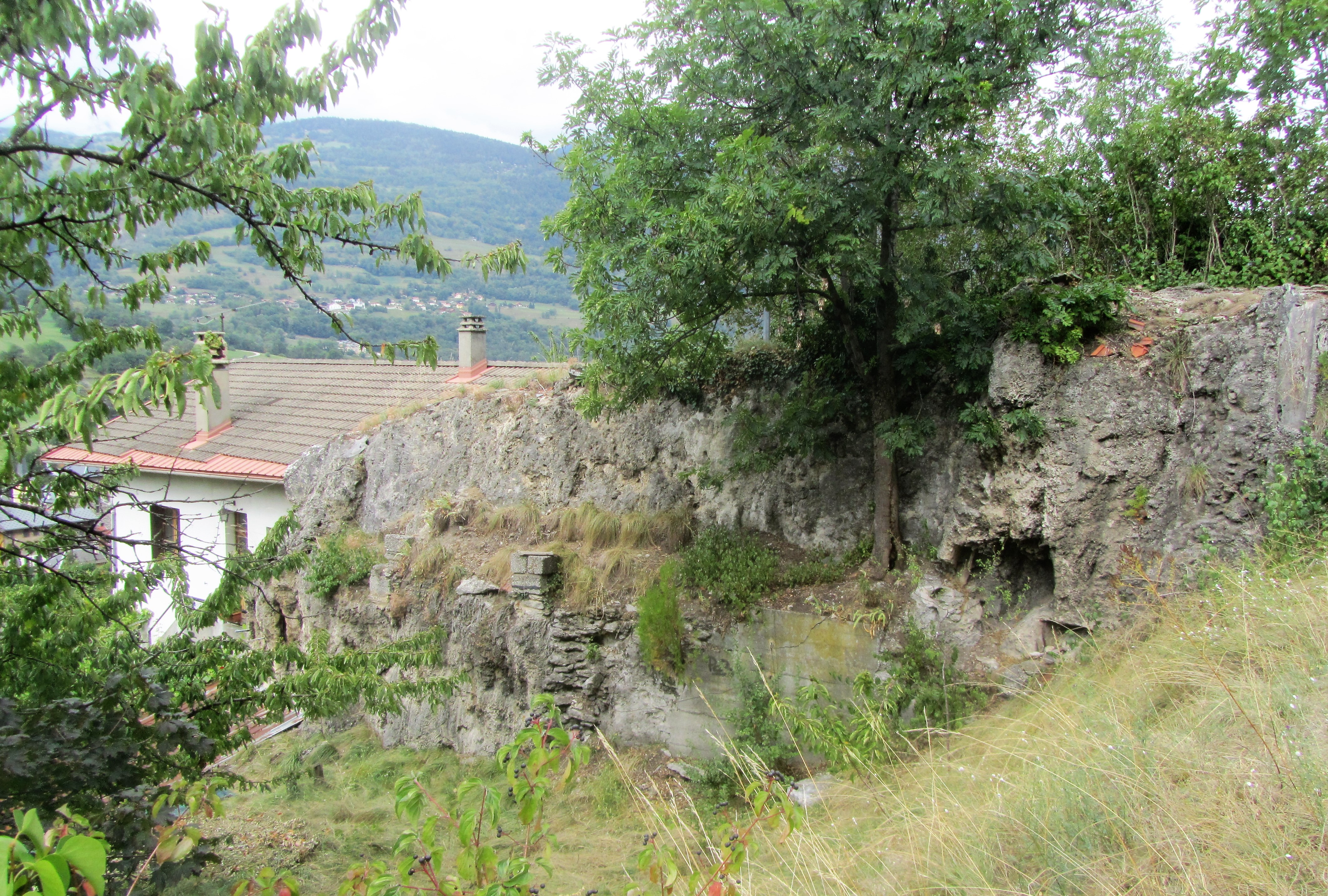 mur de tuf à l'amont de la cascade d'un moulin